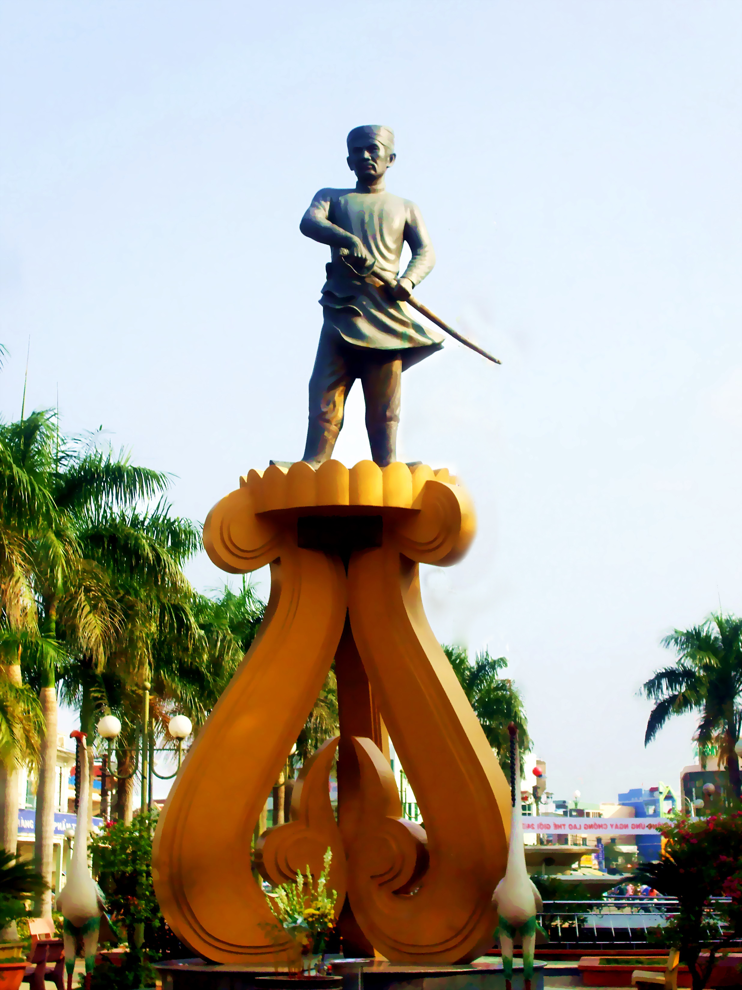 Tượng đài Anh hùng dân tộc Nguyễn Trung Trực (1839–1868) tại công viên trung tâm TP Rạch Giá, tỉnh Kiên Giang, Việt Nam.